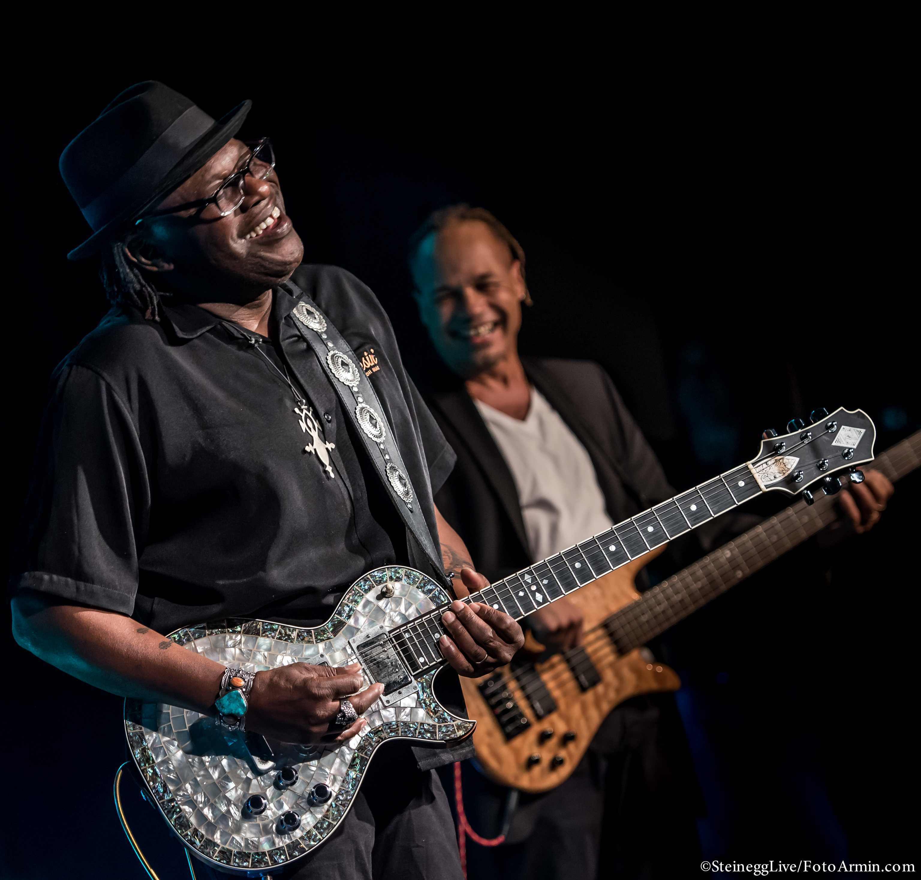 Joe Louis Walker beim Steinegg Live Festival 2018 in Steinegg bei Bozen, Südtirol, Italien